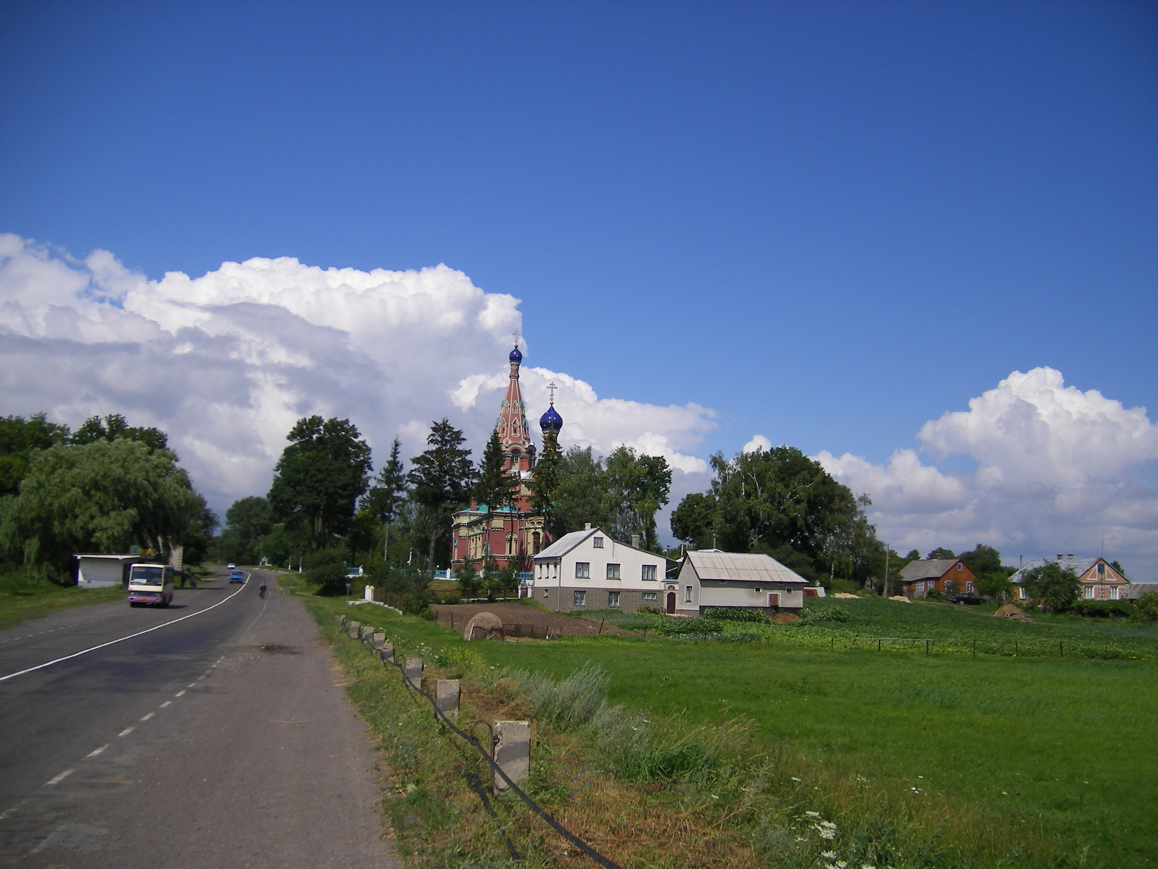 Zhuravnyky, Horokhiv Raion